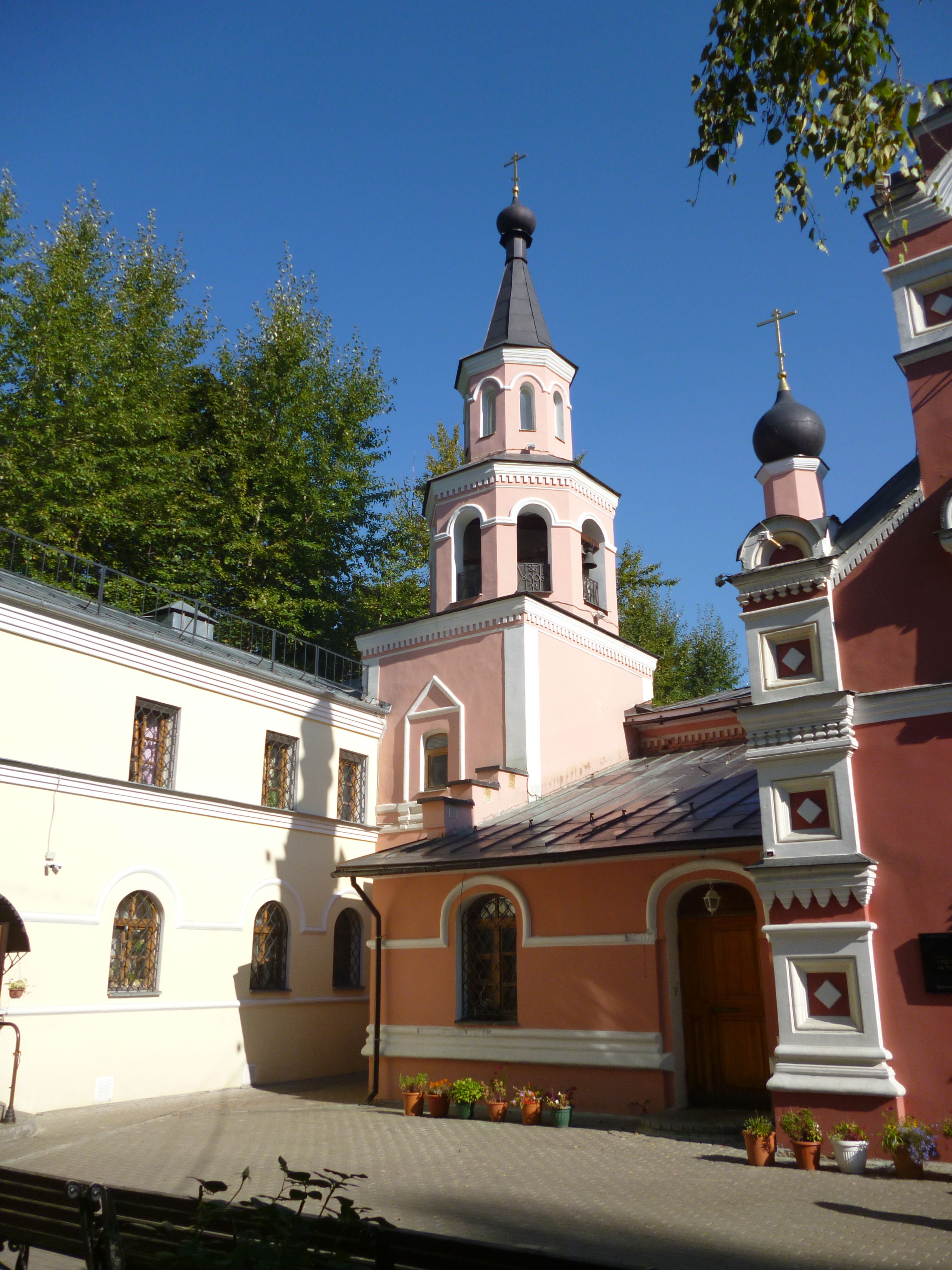 Храм иконы Божией Матери Скоропослушница на Ходынском поле: Рыбалко Маршала ул., дом 8, корпус 2, строение 1, Щукино, Северо-западный округ, Москва